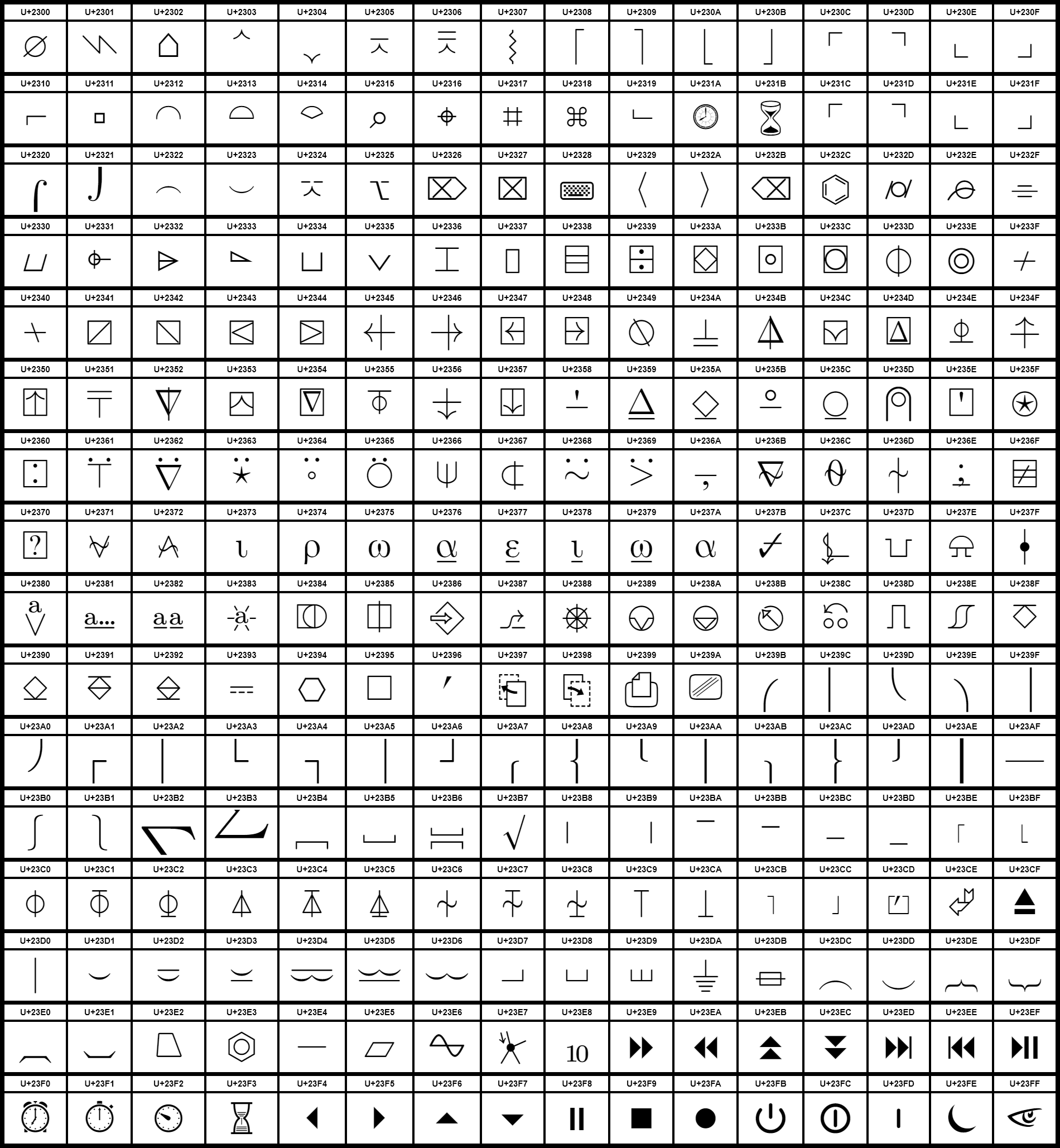 Grafiktafel für den Unicodeblock Verschiedene technische Zeichen. Schraffierte Felder sind unbesetzte Codepoints.